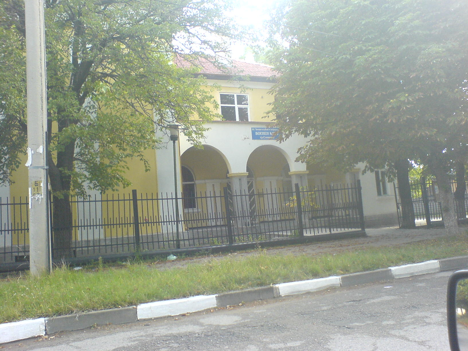 Военен клуб, Сливница Military club - Slivnitsa, Bulgaria Autor:Biser Todorov